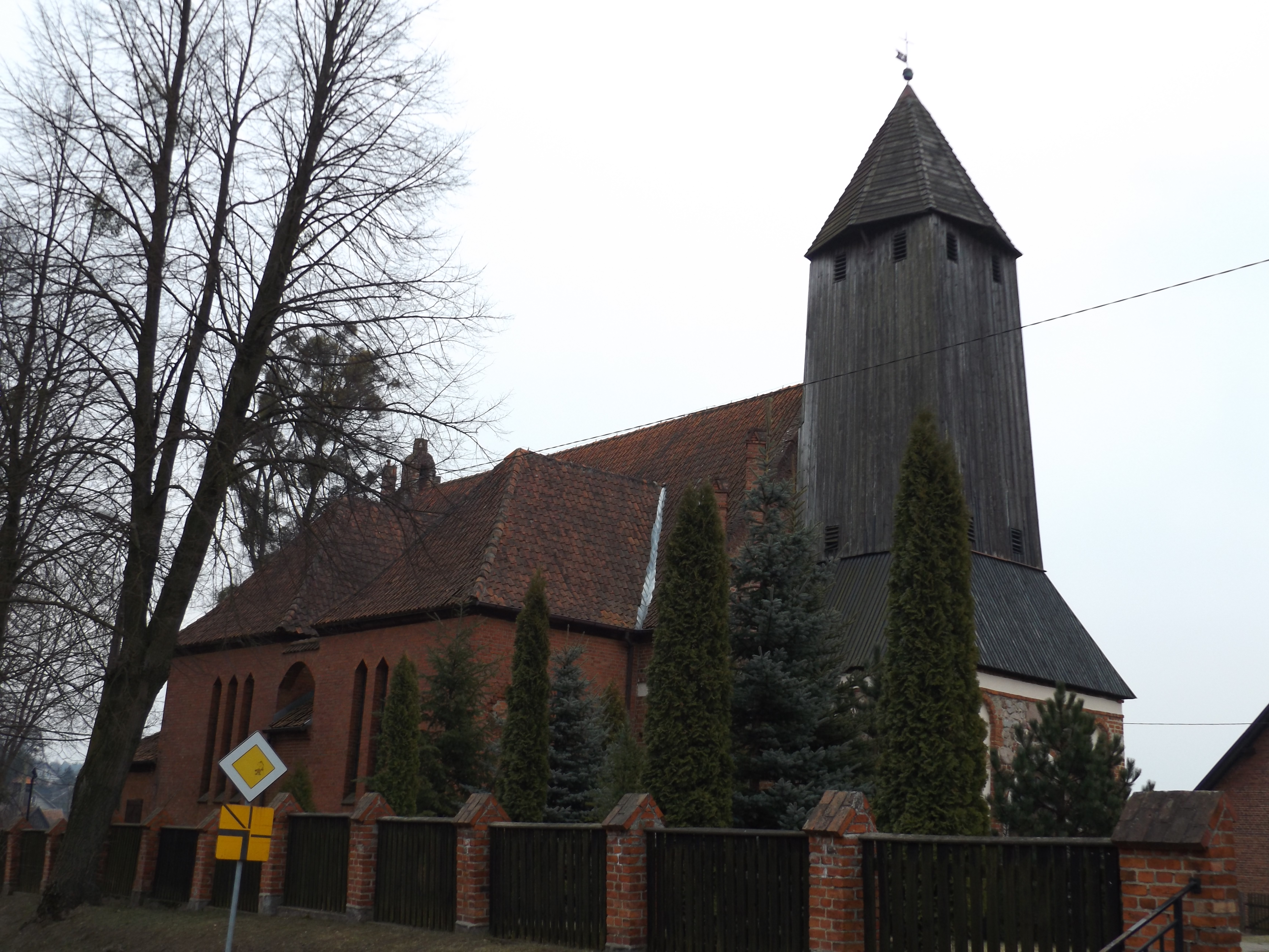 Kościół we wsi Purda